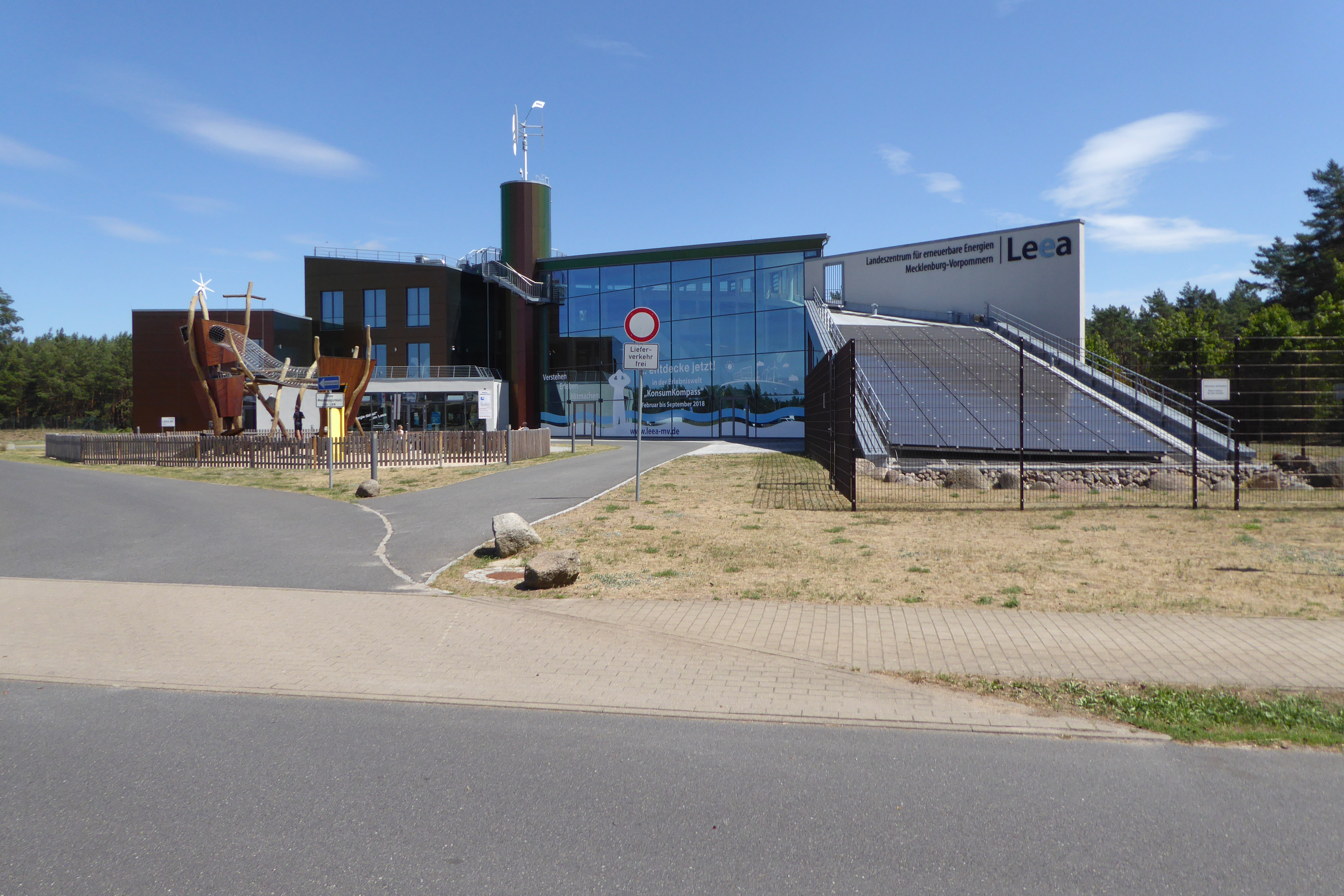 Leea - Landeszentrum für erneuerbare Energien Mecklenburg-Vorpommern, Am Kiefernwald 1, 17235 Neustrelitz, beherbergt: Landeszentrum für erneuerbare Energien Mecklenburg-Vorpommern GmbH Leea e.V. Leea Akademie - Ihr Anbieter für bedarfsgerechte Weiterbildungen in Neustrelitz Mecklenburgische Seenplatte: Die innovative Netzwerkregion für Bioenergie Landesenergie- und Klimaschutzagentur Mecklenburg-Vorpommern GmbH (LEKA MV) Quelle